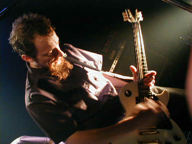 Joe Roberts von earthtone9 live